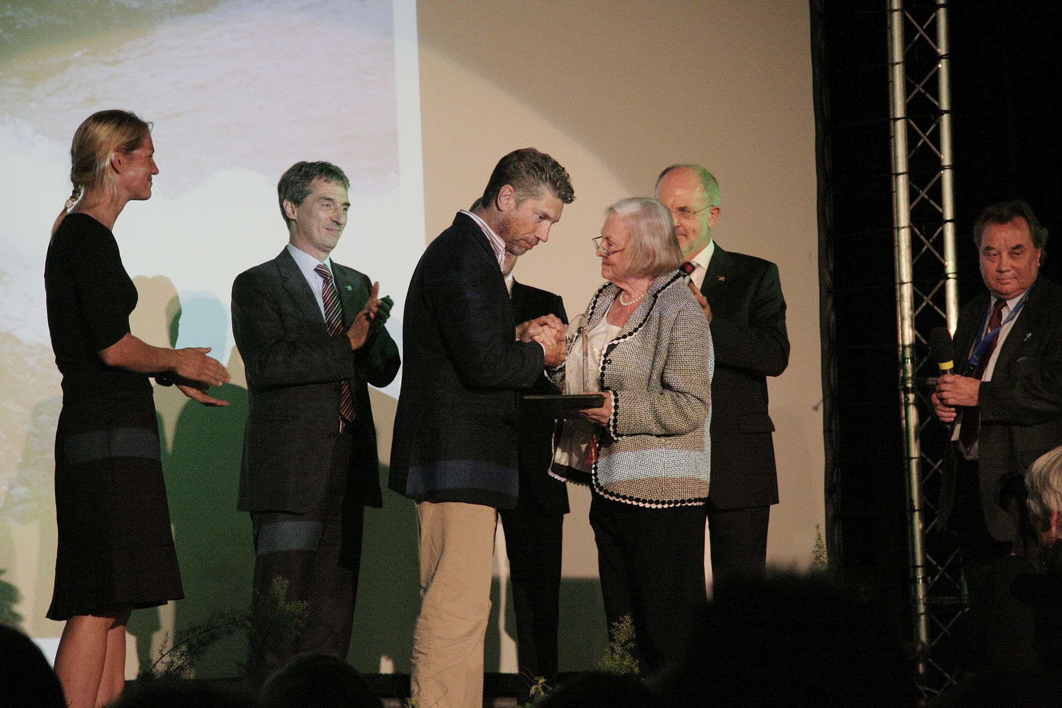 Preisverleihung Heinz-Sielmann-Preis 2009 für Eisbären können nicht weinen beim Internationalen Naturfilmfestival "GREEN SCREEN" in Eckernförde; im Vordergrund von links: Christina Karliczek (Kamera), Thomas Behrend, Inge Sielmann; im Hintergrund von links: Stiftungsbeiräte und der Bürgermeister von Duderstadt.